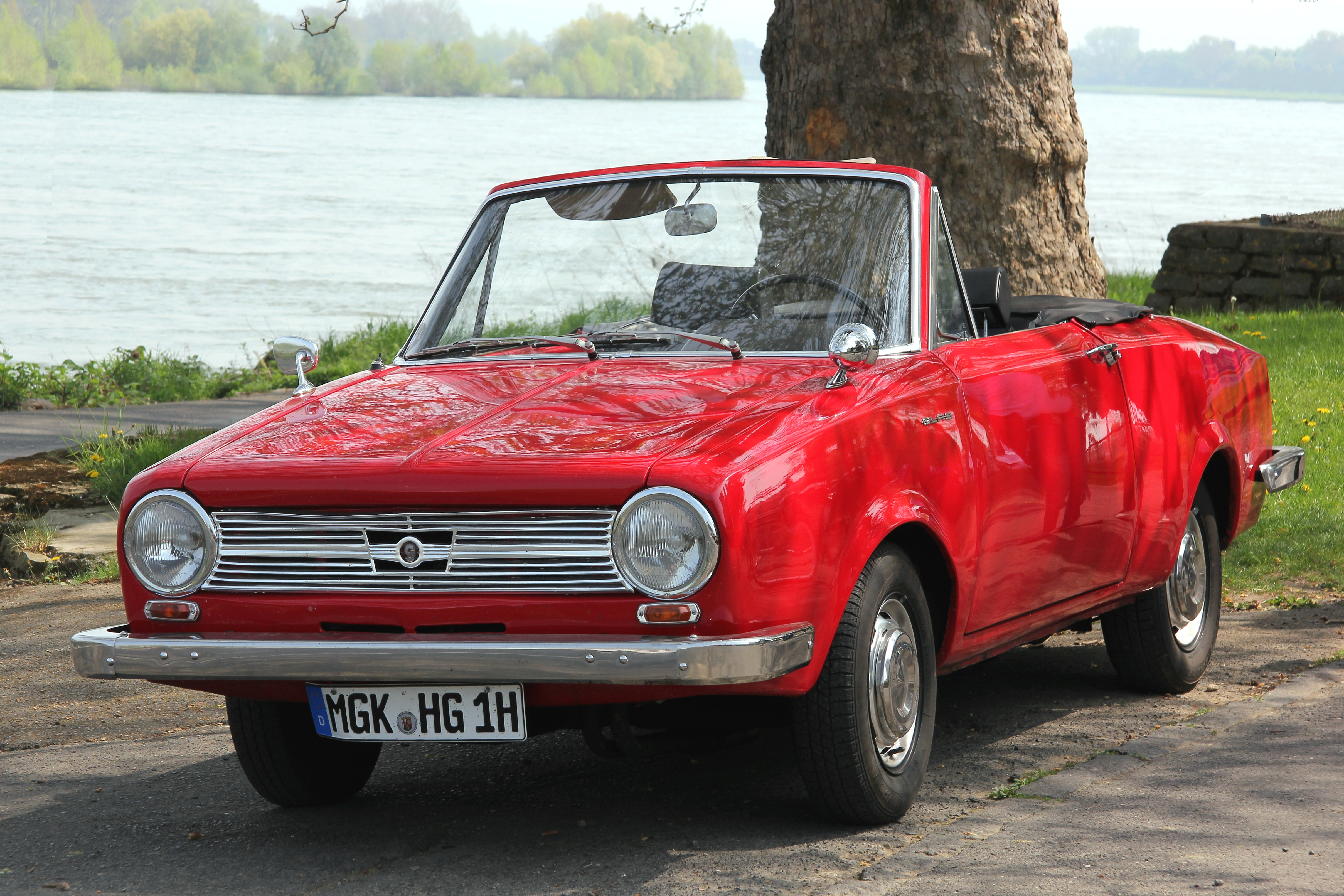 Glas 1204 Cabriolet, Baujahr 1964; Talbotspiegel links nicht original, damals aber sehr beliebt (Kennzeichen verändert)